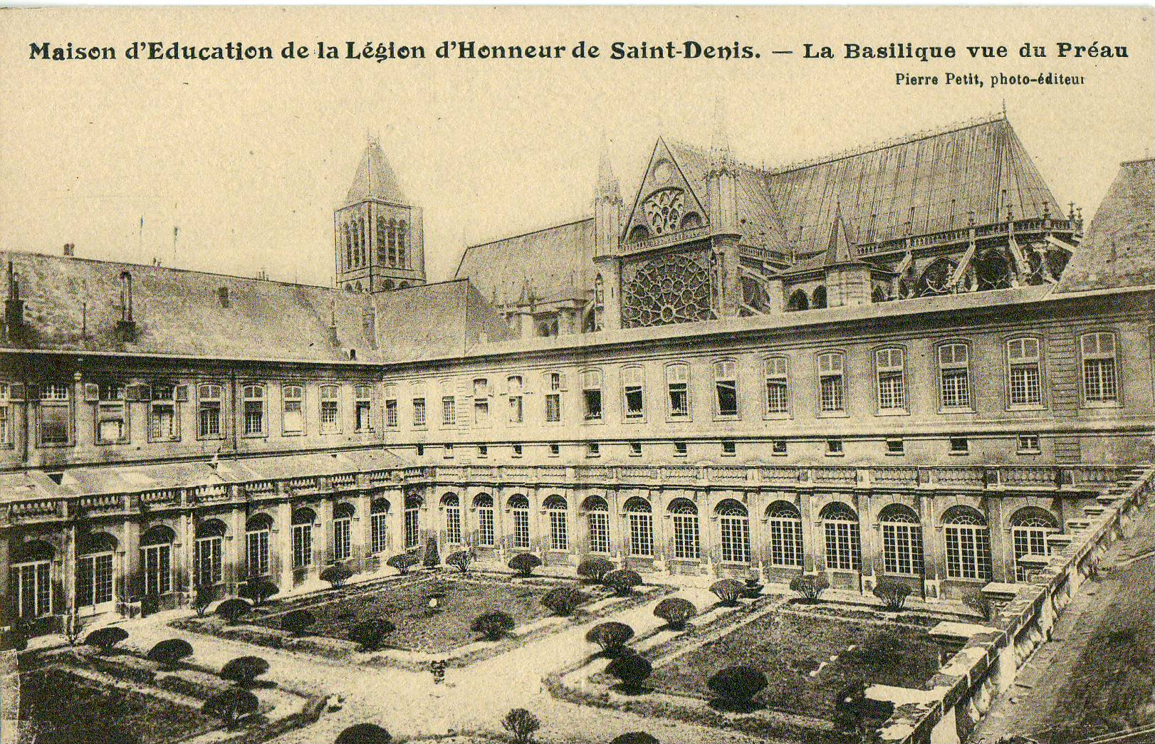 carte postale ancienne éditée par PetitMaison d'éducation de la Légion d'Honneur de Saint-Denis - La basilique vue du Préau